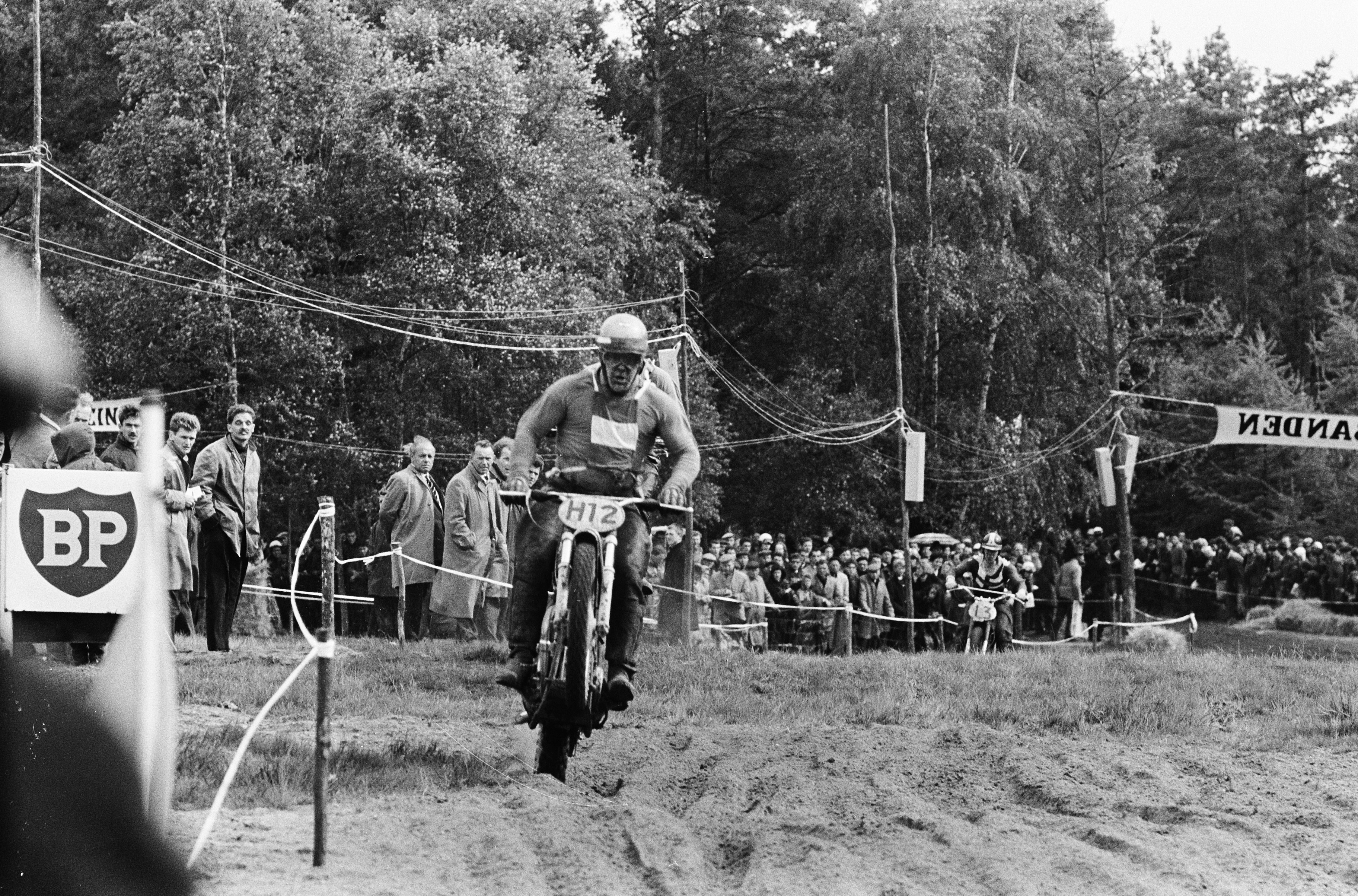 Collectie / Archief : Fotocollectie Anefo Reportage / Serie : [ onbekend ] Beschrijving : Internationale Motor-Cross Grand Prix 1963 in Markelo verreden. Nr. 9, 10 Broer Dirkx Datum : 19 mei 1963 Locatie : Markelo Trefwoorden : Motorcross Fotograaf : Pot, Harry / Anefo Auteursrechthebbende : Nationaal Archief Materiaalsoort : Negatief (zwart/wit) Nummer archiefinventaris : bekijk toegang 2.24.01.05 Bestanddeelnummer : 915-1795